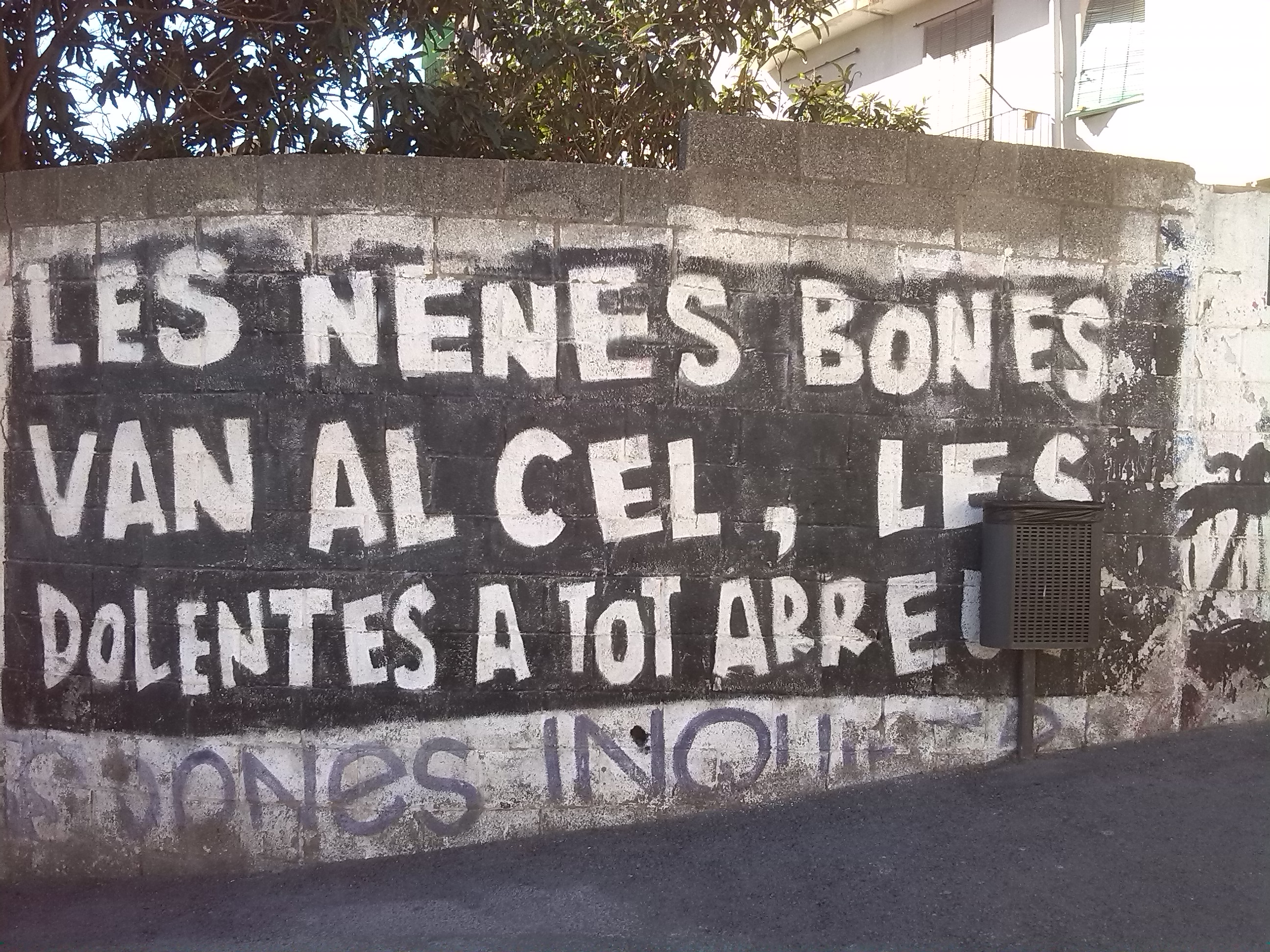 Mural feminista a Manresa amb el text "les nenes bones van al cel, les dolentes a tot arreu"